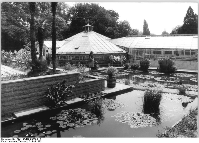 Halle, Botansicher Garten, Seerosenteich, Gewächshäuser ADN-ZB Lehmann 6.6.83 Halle: Der Botanische Garten der Martin-Luther-Universität ist als "Grüne Oase" inmitten der Industriestadt eine beliebte Stätte der Bildung und Erholung. Zu der 1968 gegründeten Anlage gehören auch der Seerosenteich und das Victoria- und Immergünen-Schauhaus. Etwa 12.000 Arten tropischer und subtropischer Wasser-, Sumpf- und Mittelmeerpflanzen sowie Kakteen und Orchideen können auf den Freianlagen und in den Gewächshäusern bewundert werden. - siehe 17n